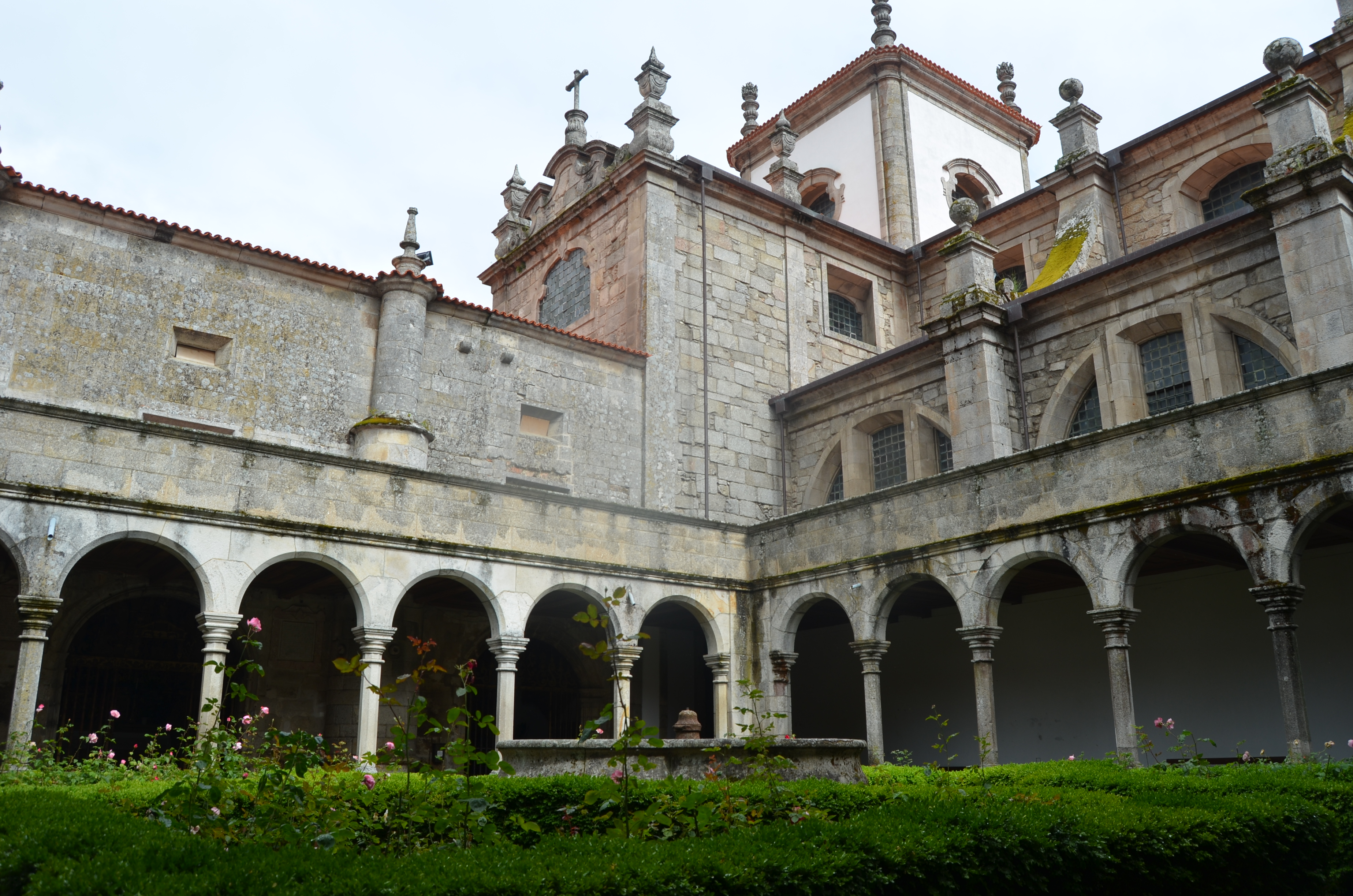 Lamego